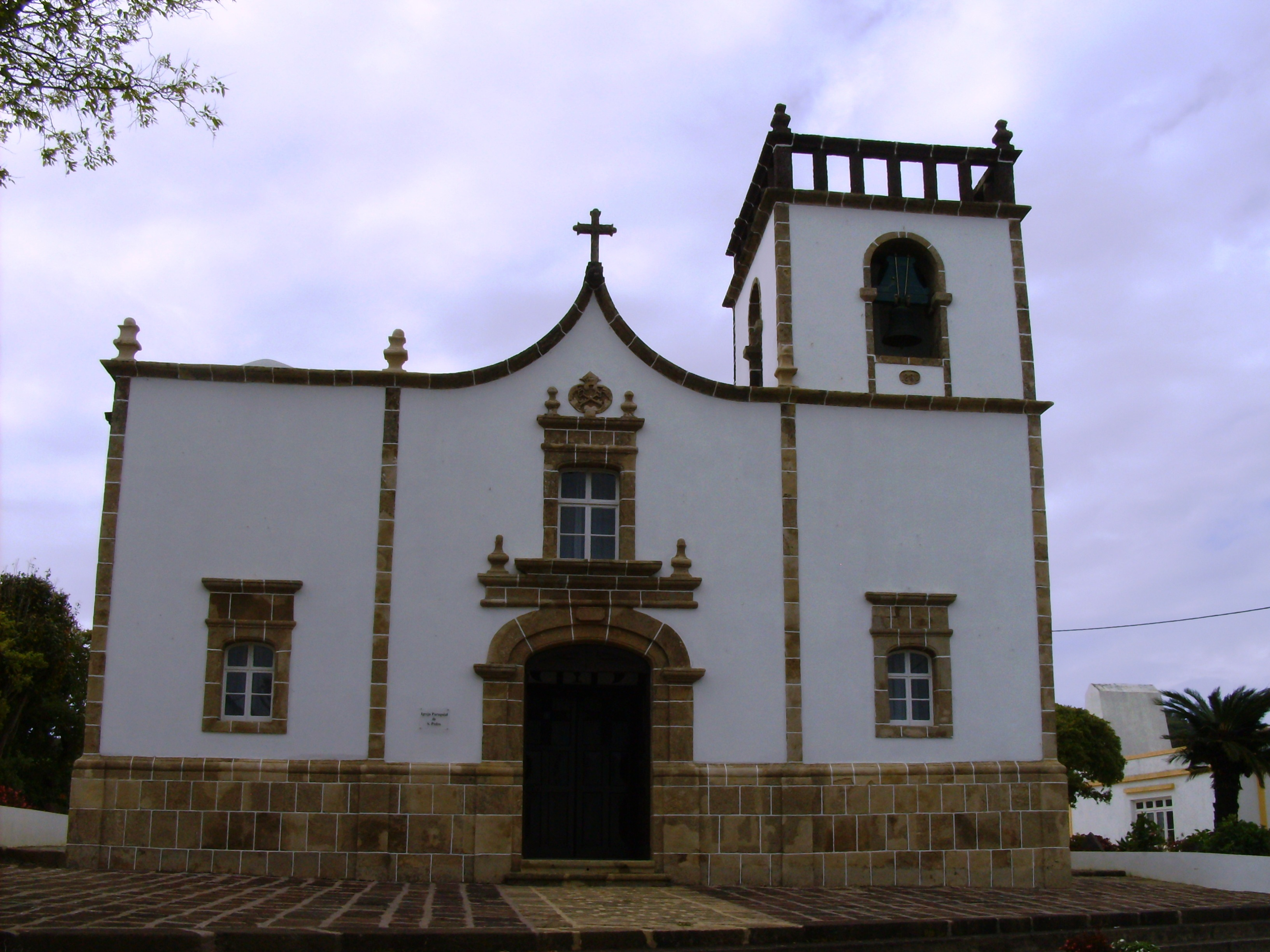 Igreja de São Pedro, Ilha de Santa Maria (Açores), Portugal.